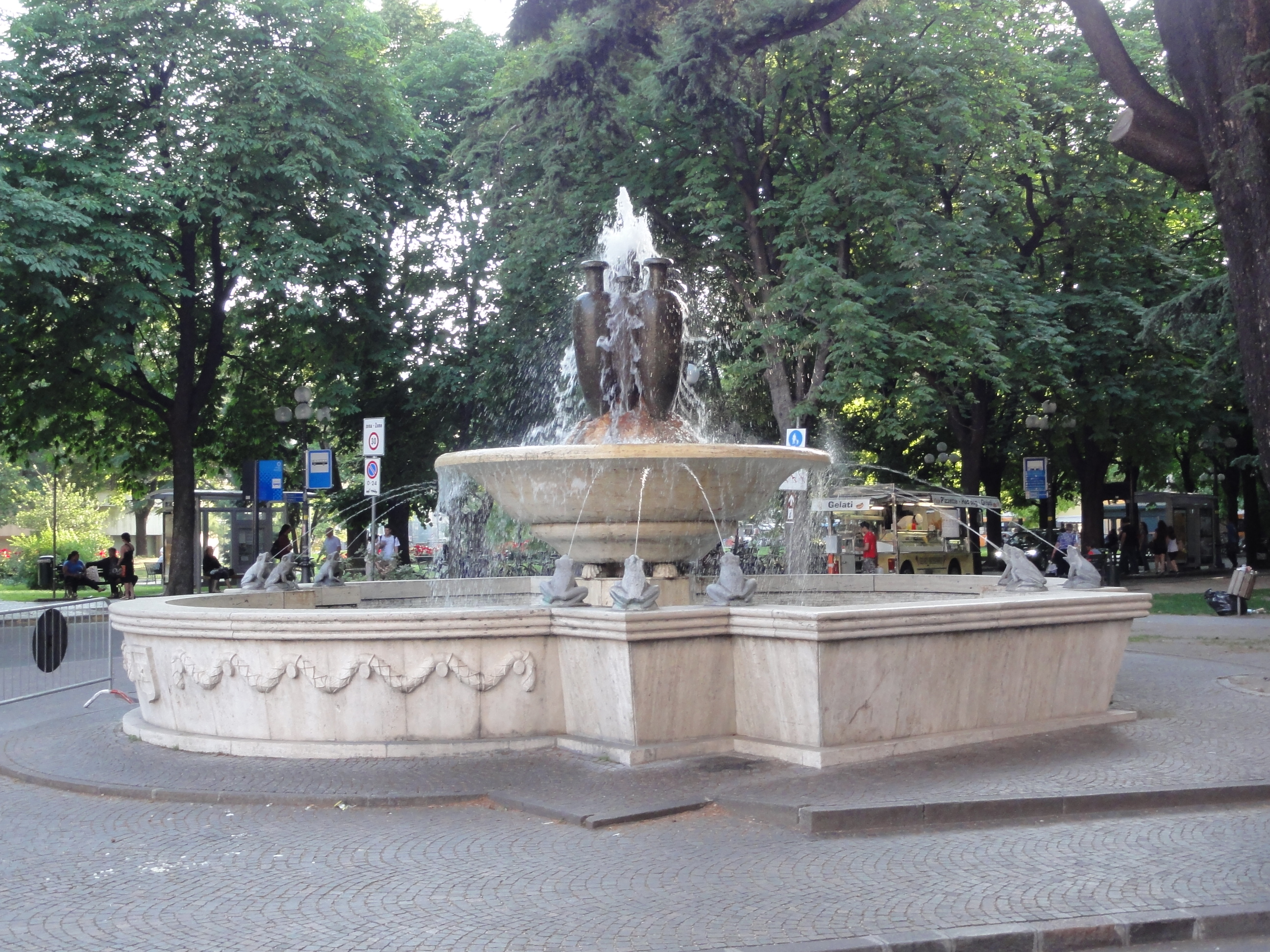 Bozen-Bolzano — Brunnen vor dem Hauptbahnhof, am Beckenrand Froschskulpturen